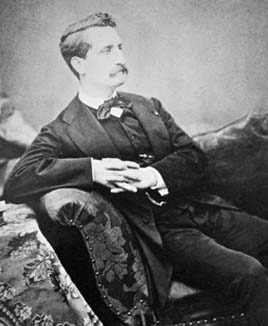 Retrat de Amédée Mannheim (1831-1906), matemàtic i militar francès.